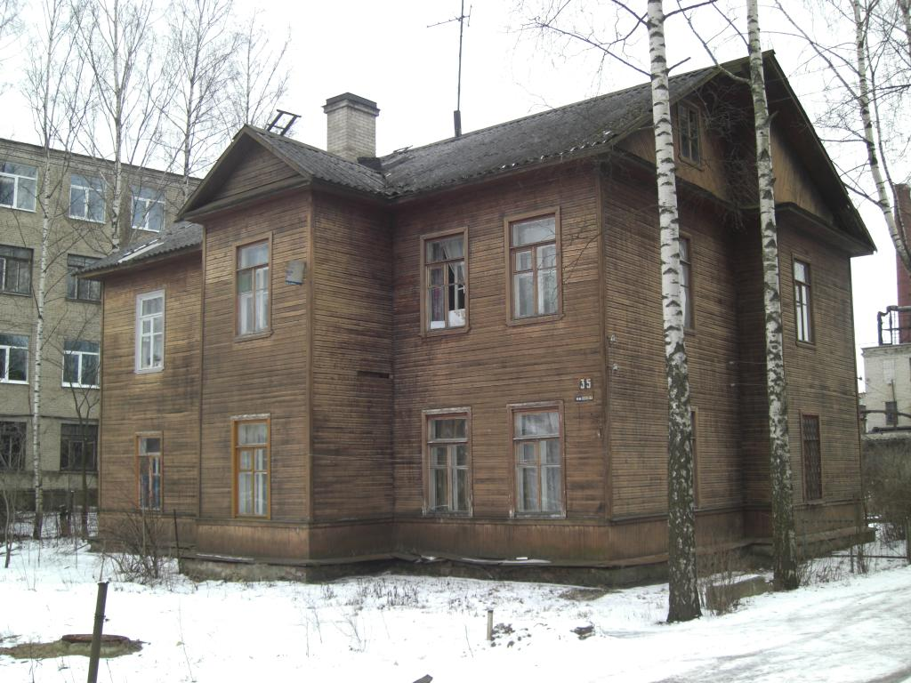 Жилой дом на улице Хохлова в Гатчине